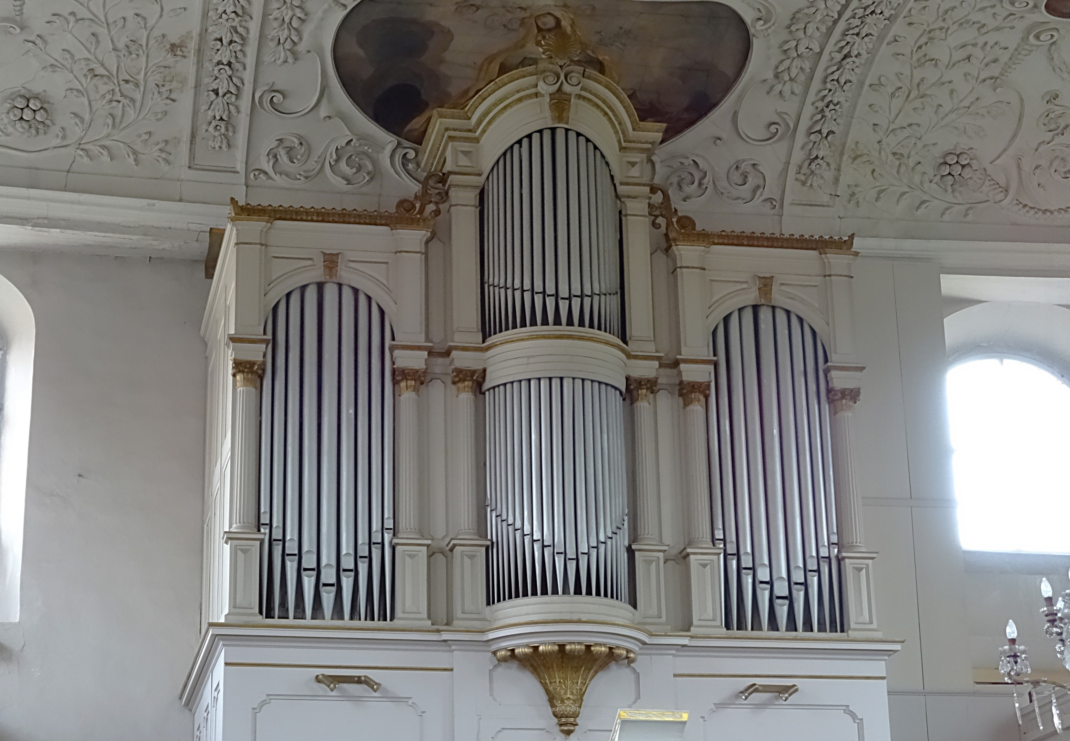 Orgel der Marien-Magdalenen-Kirche (Naumburg) von Friedrich Ladegast (1869 II/P 23) im alten Gehäuse von Christian Friedrich Poppe (1785)